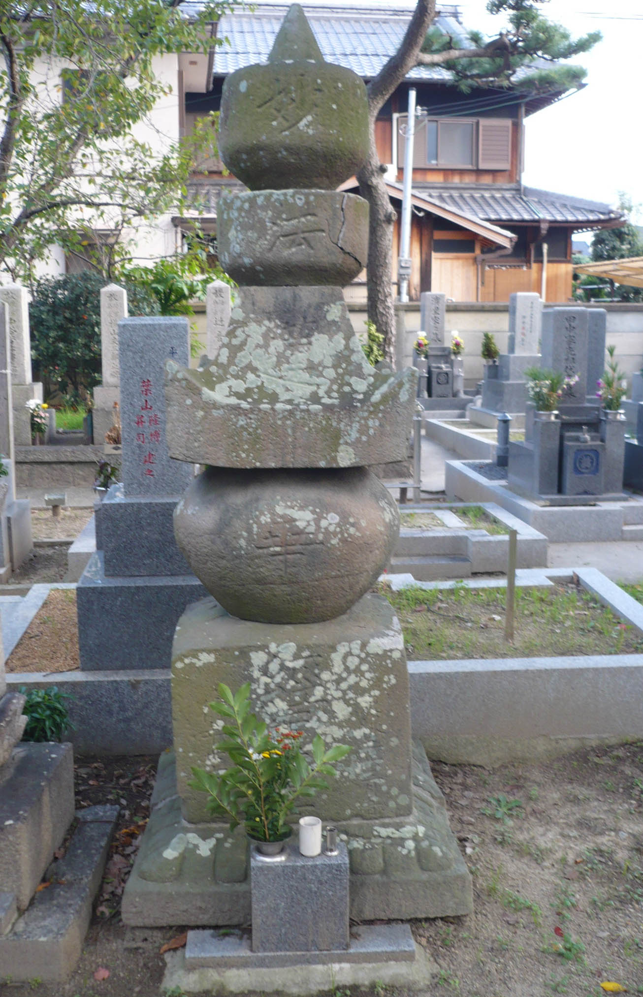 三好義賢の墓